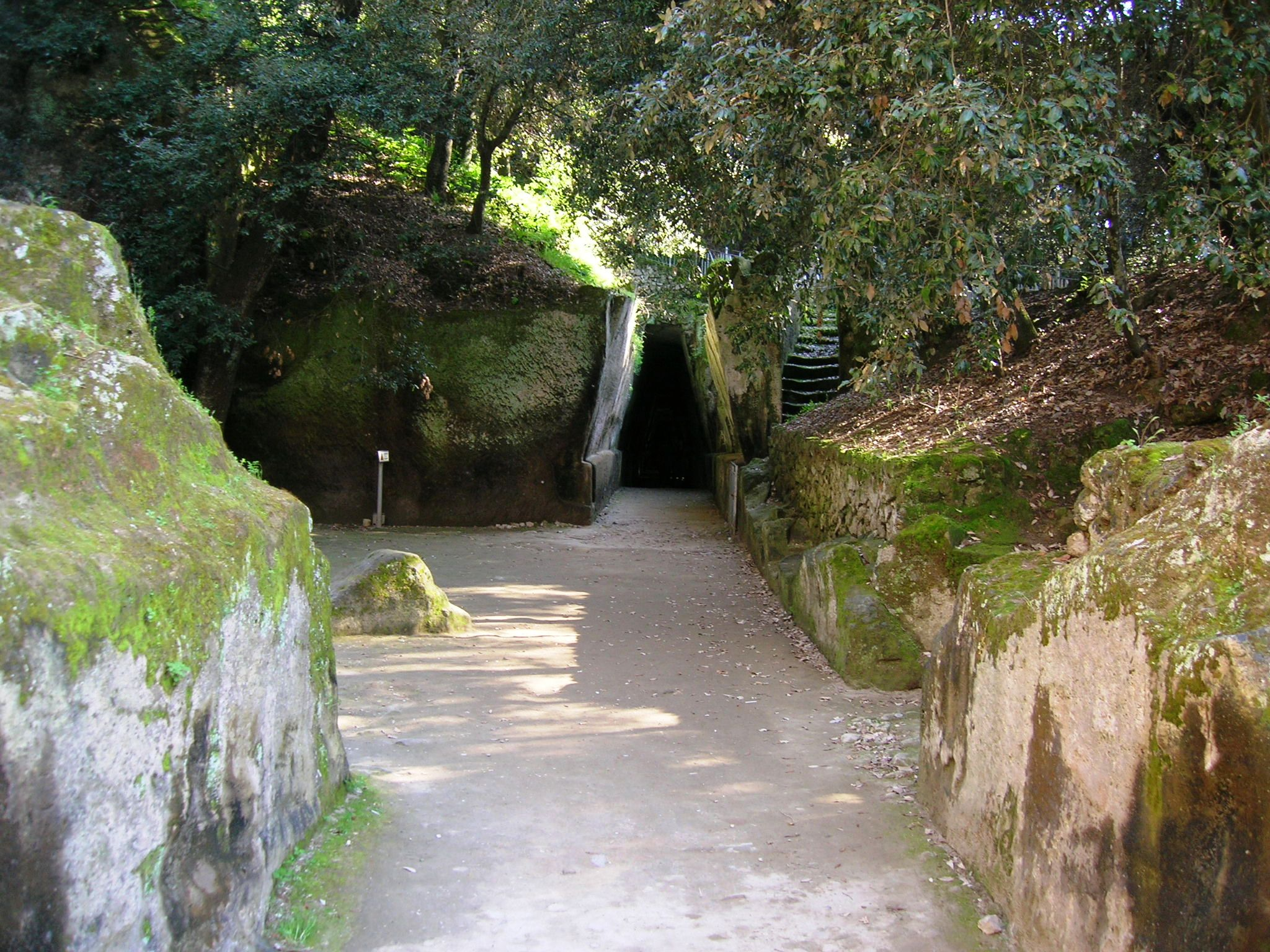 L'esterno